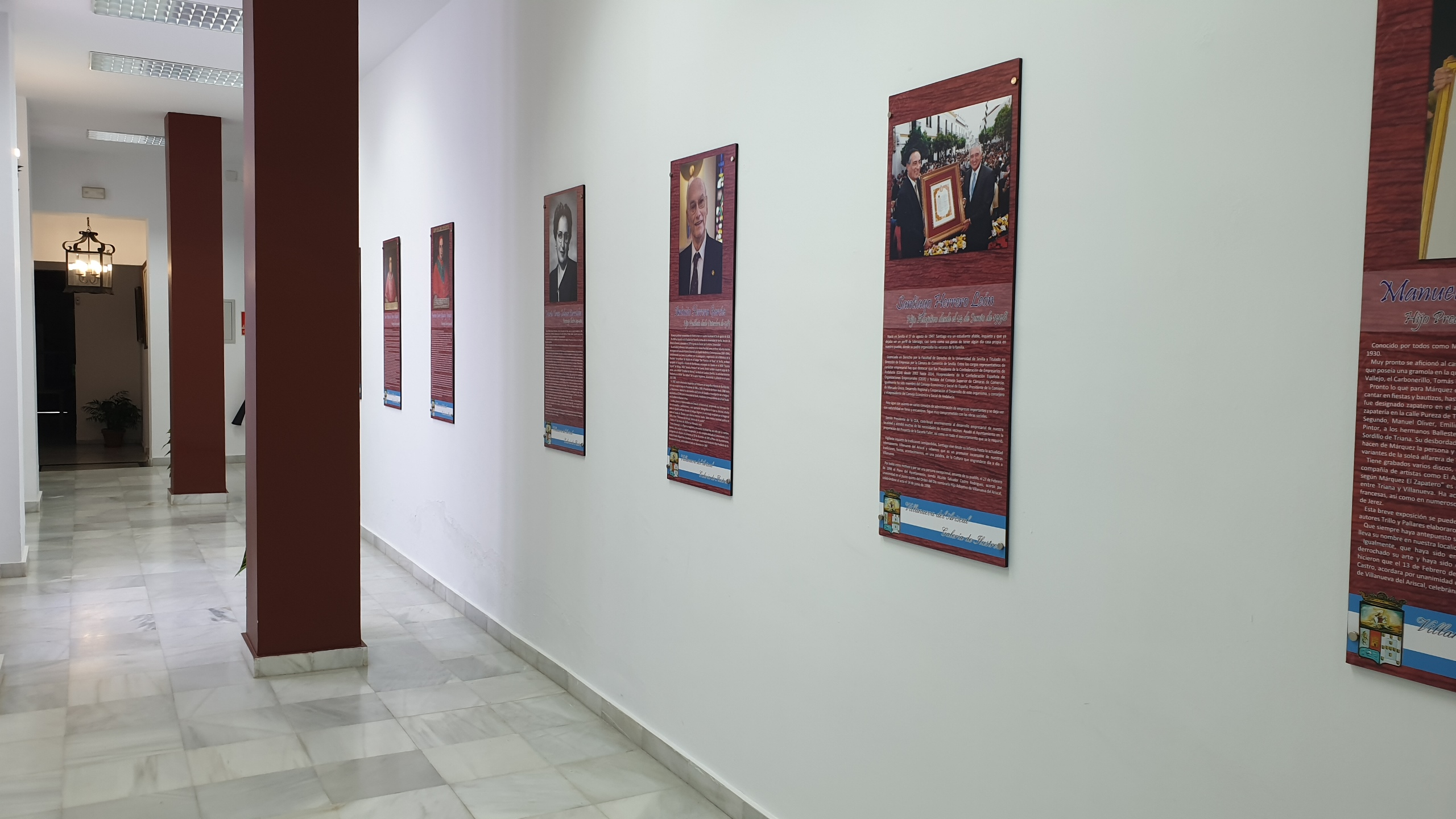 Galería de los Ilustres en el Ayuntamiento de Villanueva del Ariscal